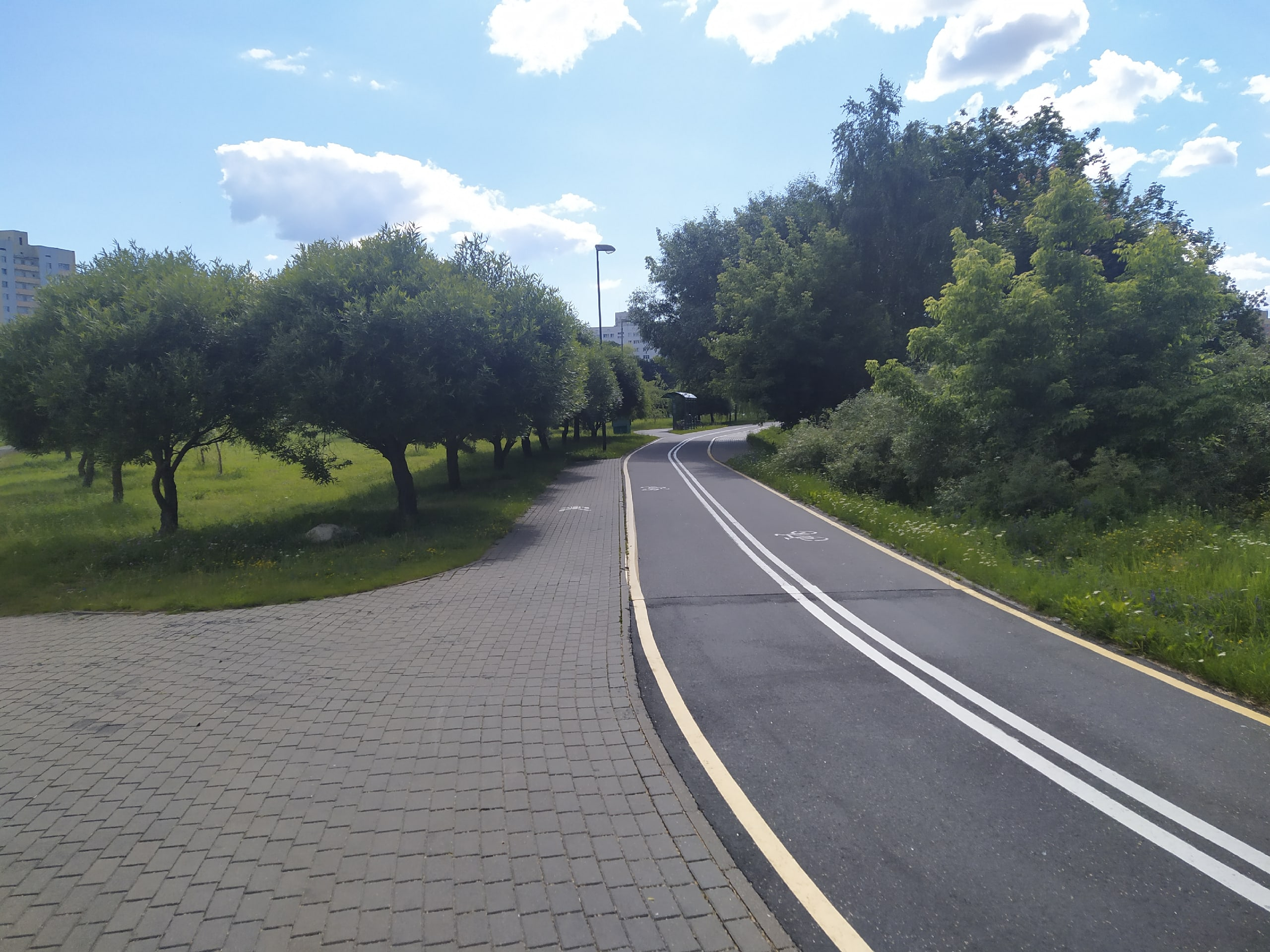 Во многом отгорожена от автомоблей.